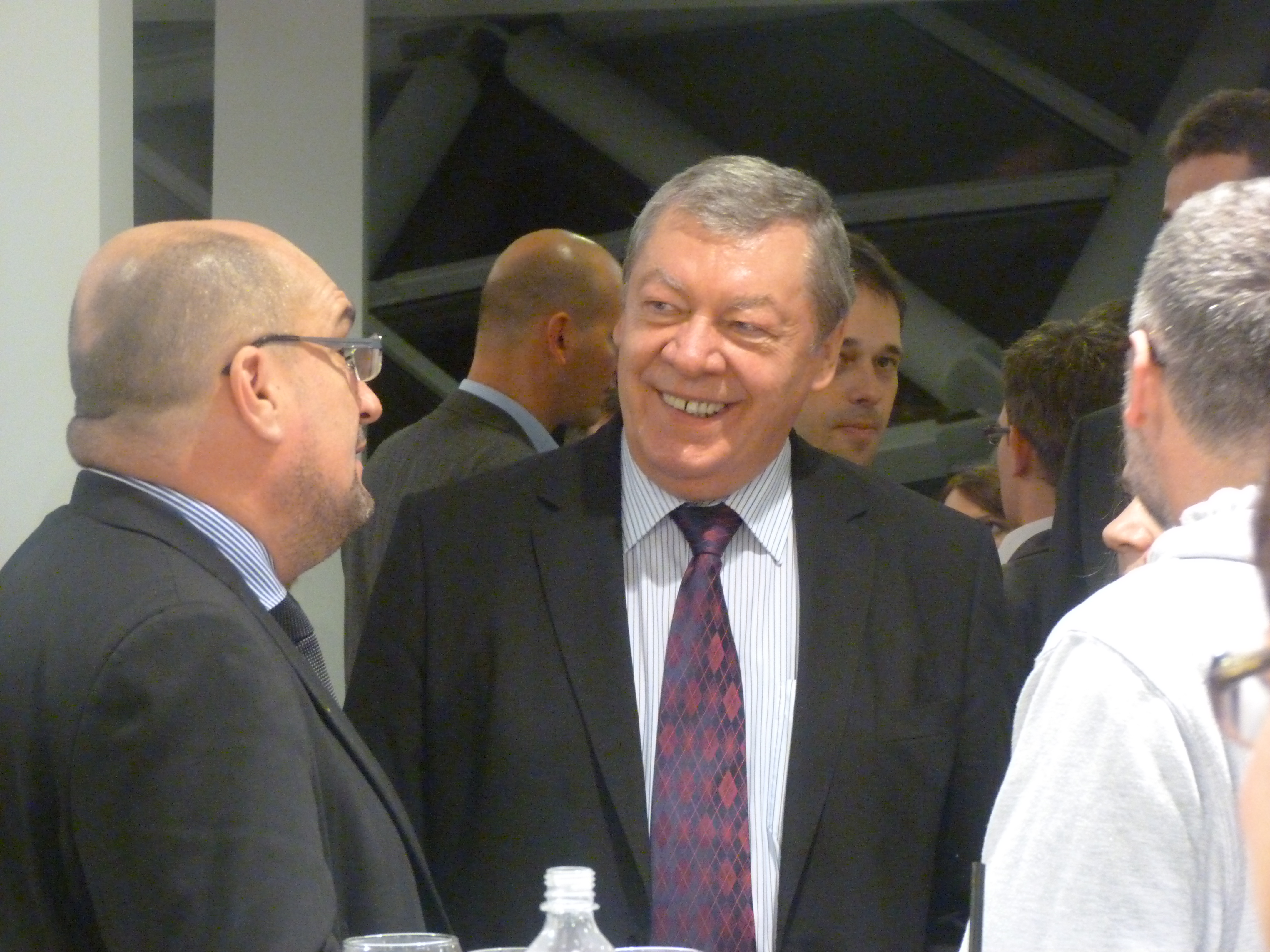 A felvétel 2014. április 6 –án, vasárnap készült Budapesten, a Bálna előtt és a Bálna Eredményváró. (1-51). Ezen a napon tartották Magyarországon az országgyűlési képviselőválasztást. A Bálna előtt gyülekezők az eredményt várták. Az ott felállított pódiumon köszönte meg a választók bizalmát Orbán Viktor. Lévai Anikó, Tőkés László, Jókai Anna, Martonyi János, Bába Iván, Szász Jenő, Gálné Pelcz Ildikó, Illés Zoltán, Andy Vajna, Bayer Zsolt, Pataky Attila, Vidnyánszky Attila, Sára Sándor. A választáson a FIDESZ-KDNP pártszövetség 2010 után újra kétharmados többséget szerzett a választáson. Képviselői helyek: FIDESZ-KDNP : 133, MSZP–Együtt–DK– PM–MLP: 38, Jobbik: 23, LMP: 5 képviselői hely. Az országos listákra leadott szavazatok száma: Fidesz–KDNP 2 264 730, MSZP–Együtt– DK–PM–MLP: 1 290 804, Jobbik 1 020 476, LMP: 269 413. Forrás: FIDESZ-KDNP: újra kétharmad hozzáférés: 2014.04.14 ©© Derzsi Elekes Andor, Budapest, 2014, A kép és filmfelvételek egészben, vagy részletekben másolását, bármilyen úton történő sokszorosítását és felhasználását a szerző ellenérték nélkül, jogutódjaira is kihatóan megengedi. Az engedély kiterjed a kereskedelmi célú hasznosításra is. Kéri azonban nevének feltüntetését a felhasználás során. A Metapolisz sorozat valamennyi képe és filmje Creative Commons alatti valamint kereskedelmi - for profit - célra is felhasználható. Ajánlott hivatkozás: Derzsi Elekes Andor: Metapolisz DVD line